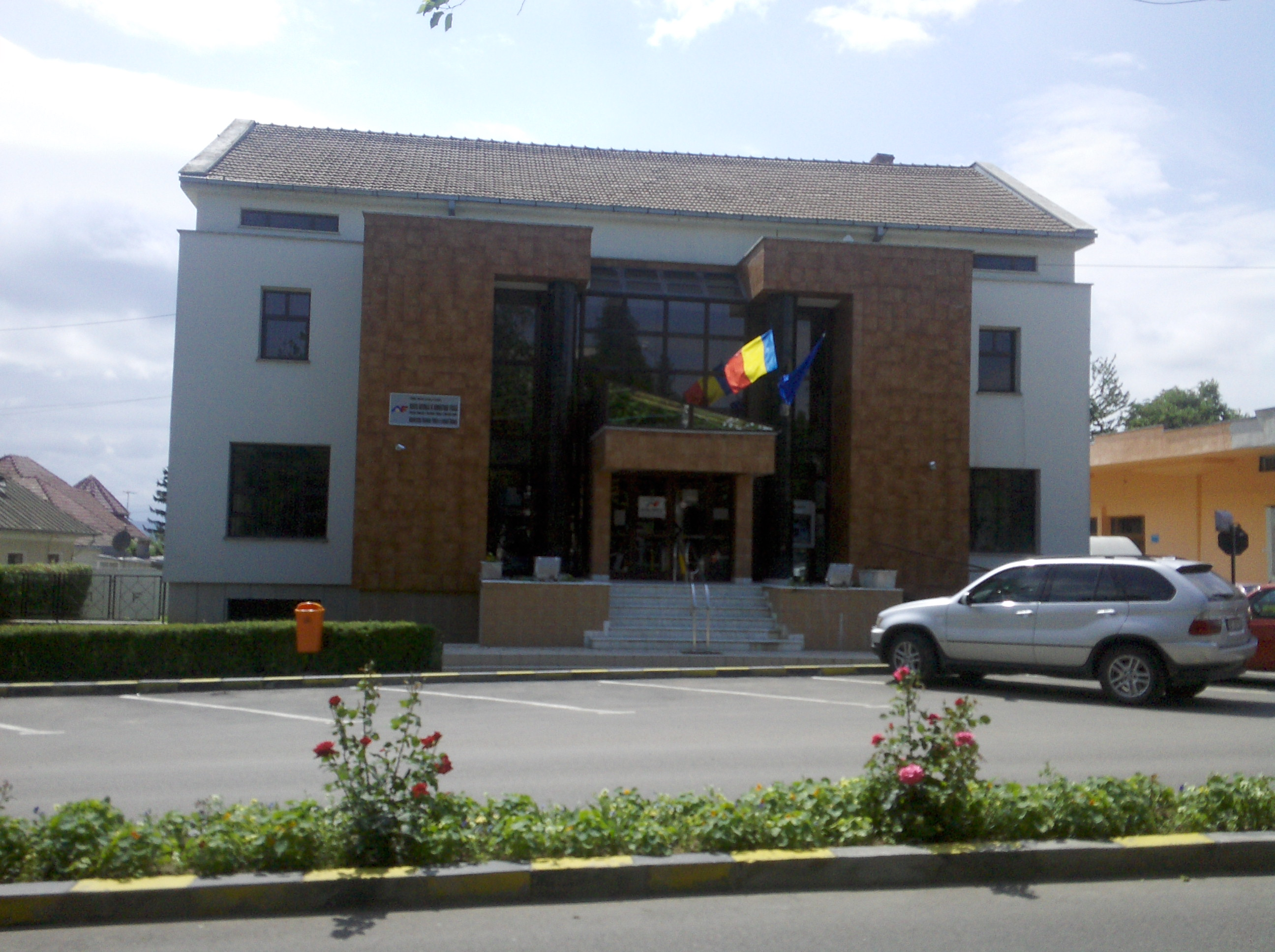 administracion finnciera de Buhuşi